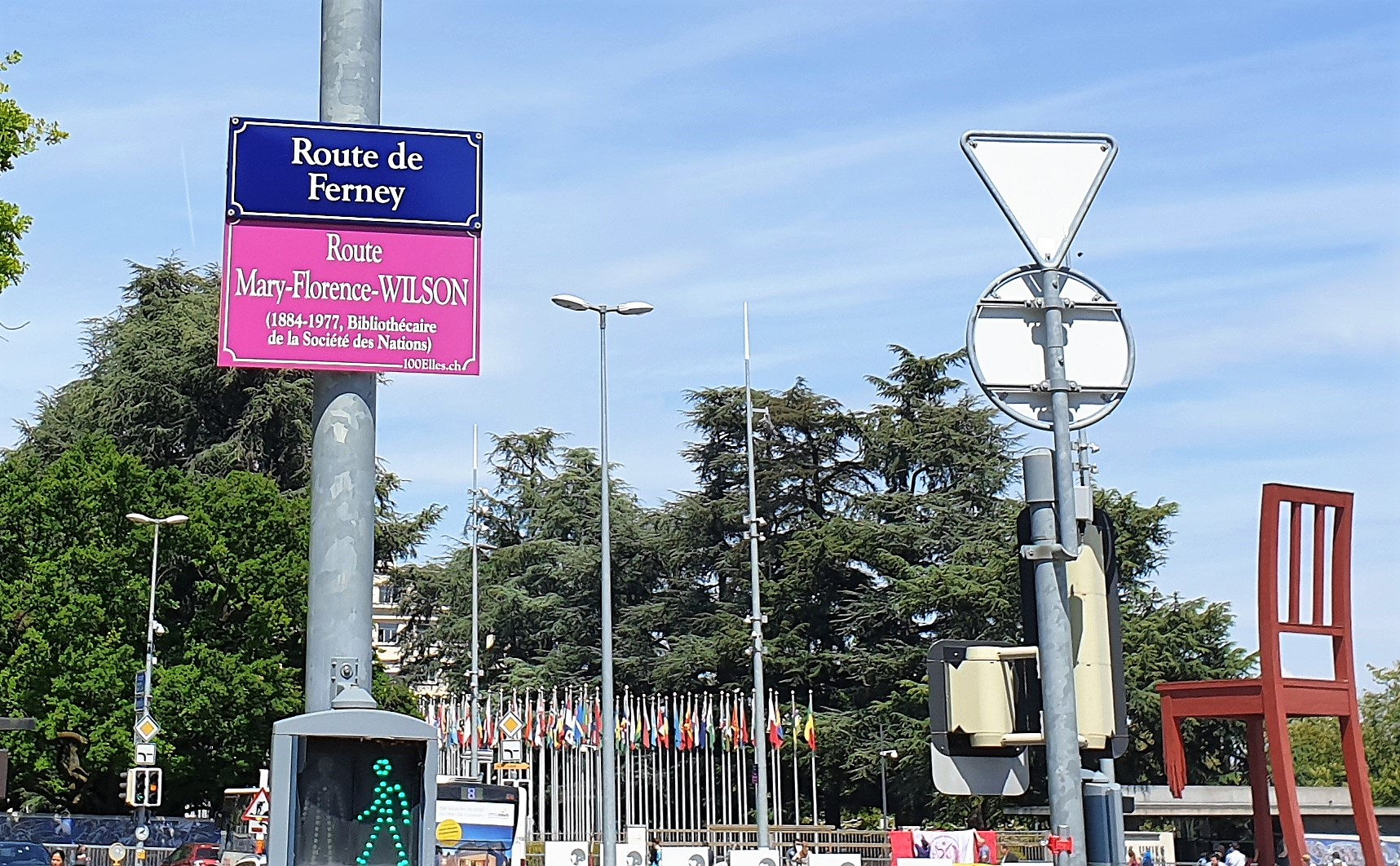 Plaque temporaire de rue apposée dans le cadre du projet 100elles à Genève en 2019